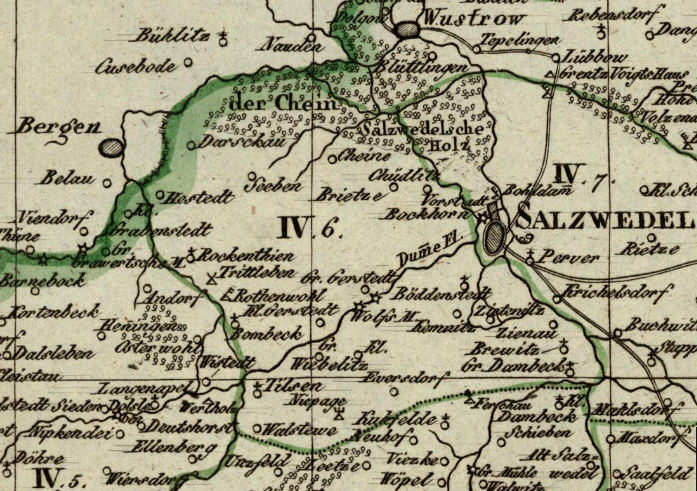 Der Kanton Salzwedel-Stadt (1807-13) im Königreich Westphalen